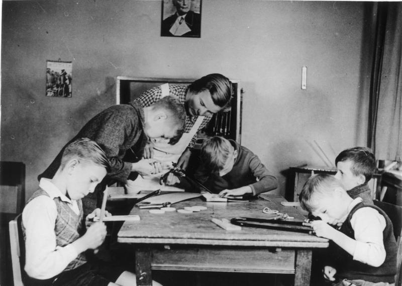 NSV-Kindertagesstätte Pankow, Granitzstr. Fleissige Kinderhände arbeiten Gewinne zum Kinderfest.